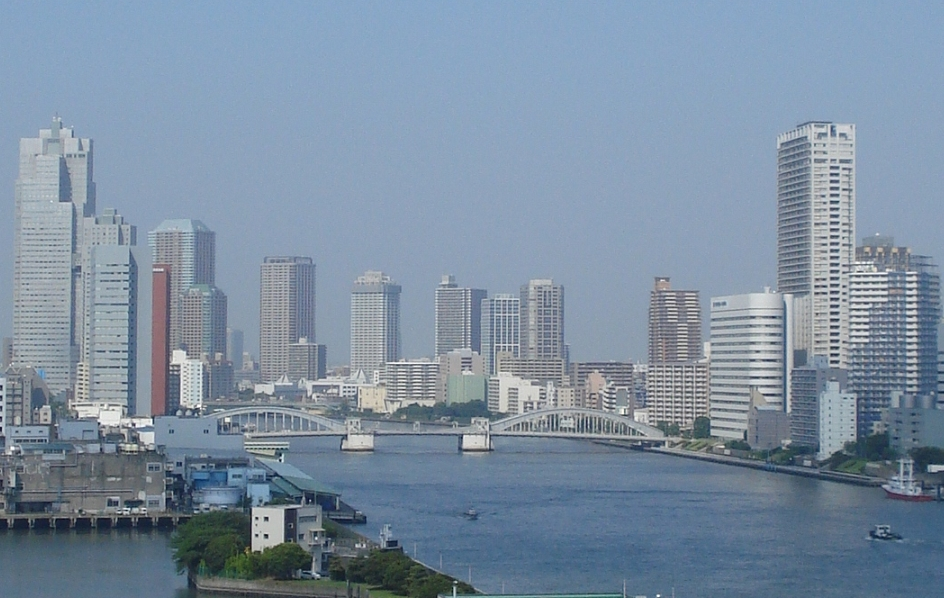 Kachidoki bridge